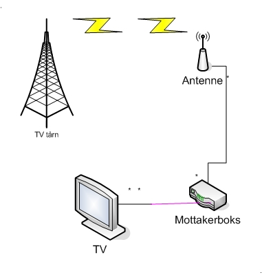 modell over digitalt bakkenett. laget i visio